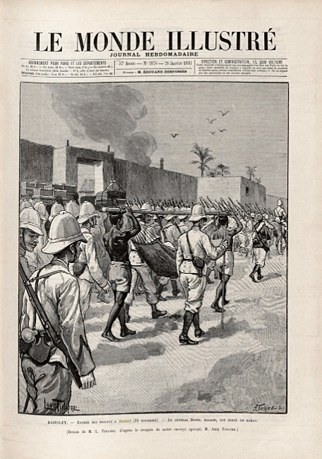 "Dahomey : Entrée des troupes à Abomey (13 novembre). Le général Dodds, malade, est porté en hamac". Dessin de Louis Tinayre, d'après un croquis d'Abel Tinayre